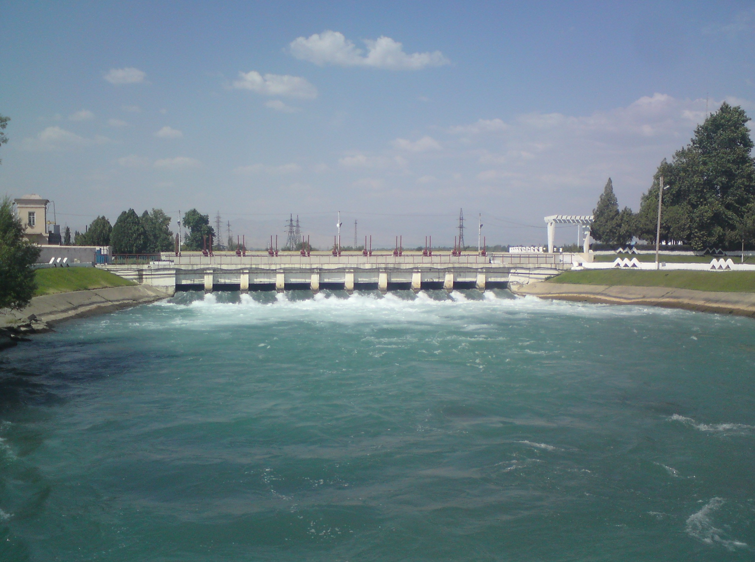 Юкарычирчикский гидроузел на реке Чирчик, начало канала Карасу Левобережного, у города Чирчика, Ташкентский вилоят, Узбекистан